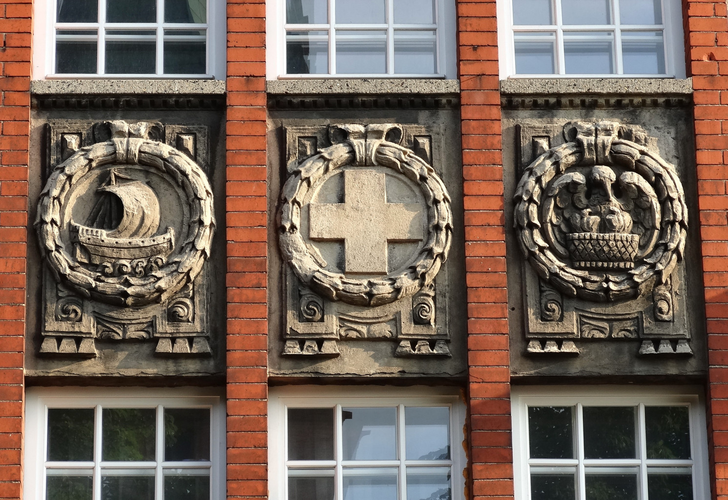 Budynek dawnej ochronki dla dzieci, zbud. 1908-1909, ob. siedziba Wojewódzkiego Ośrodka Kultury "Stara Ochronka" w Bydgoszczy pl. Kościeleckich 6